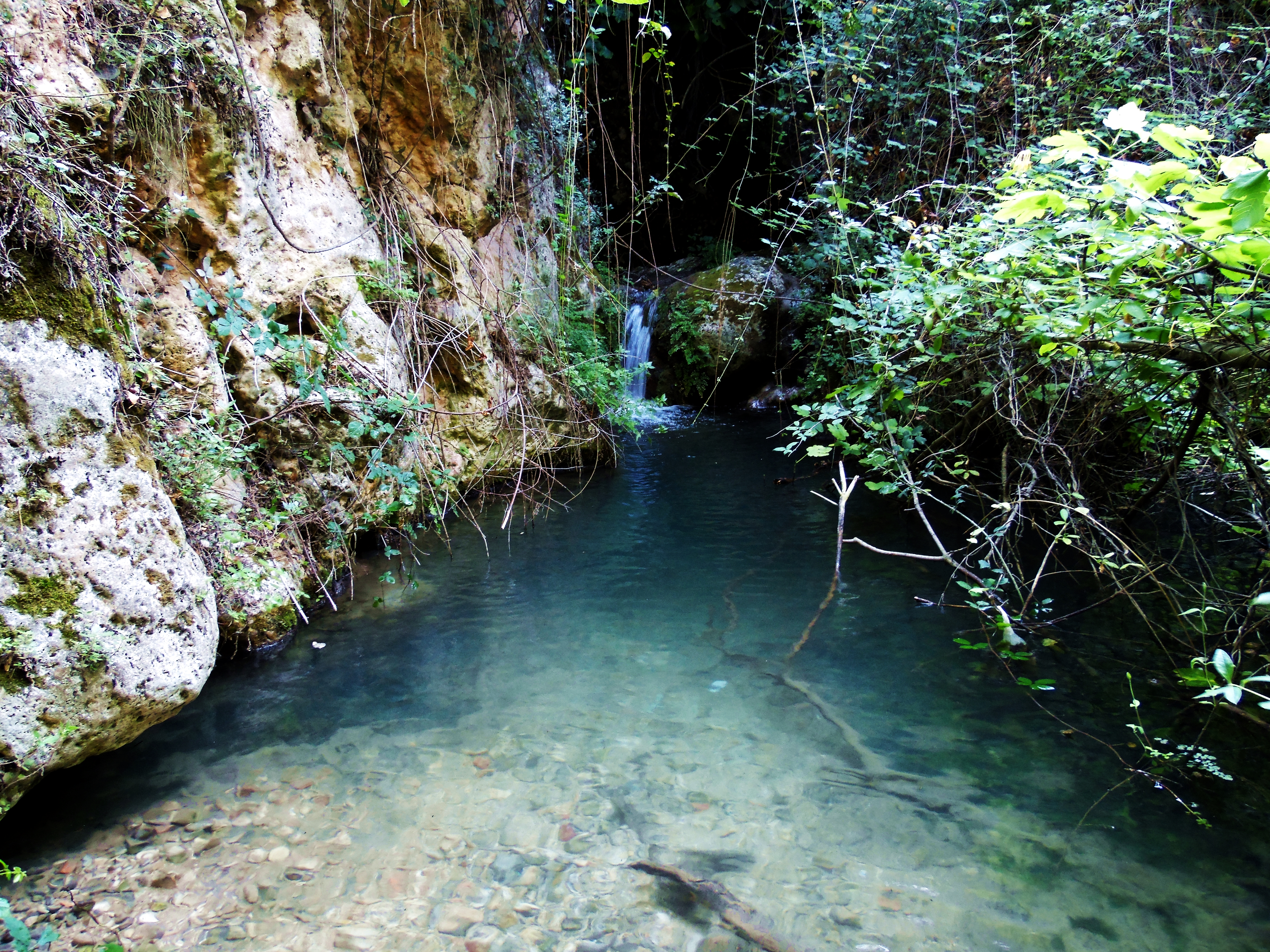 Sierra de Alcaraz y Segura y cañones del Segura y del Mundo This is a photography of a Site of Community Importance in Spain with the ID: ES4210008. Natura2000 entry, EEA entry